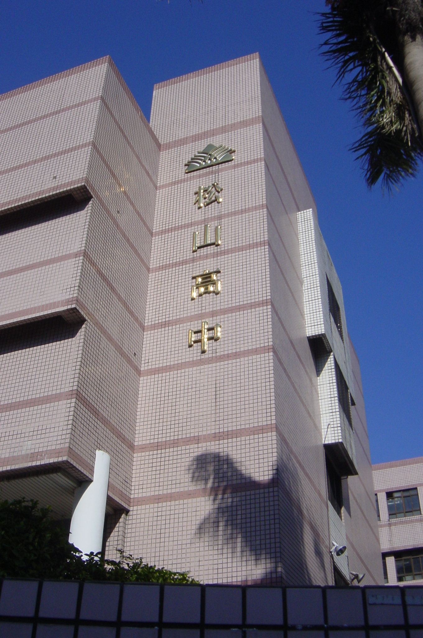 臺北市立松山高級中學教學大樓外牆釘掛的校徽鑄字招牌。